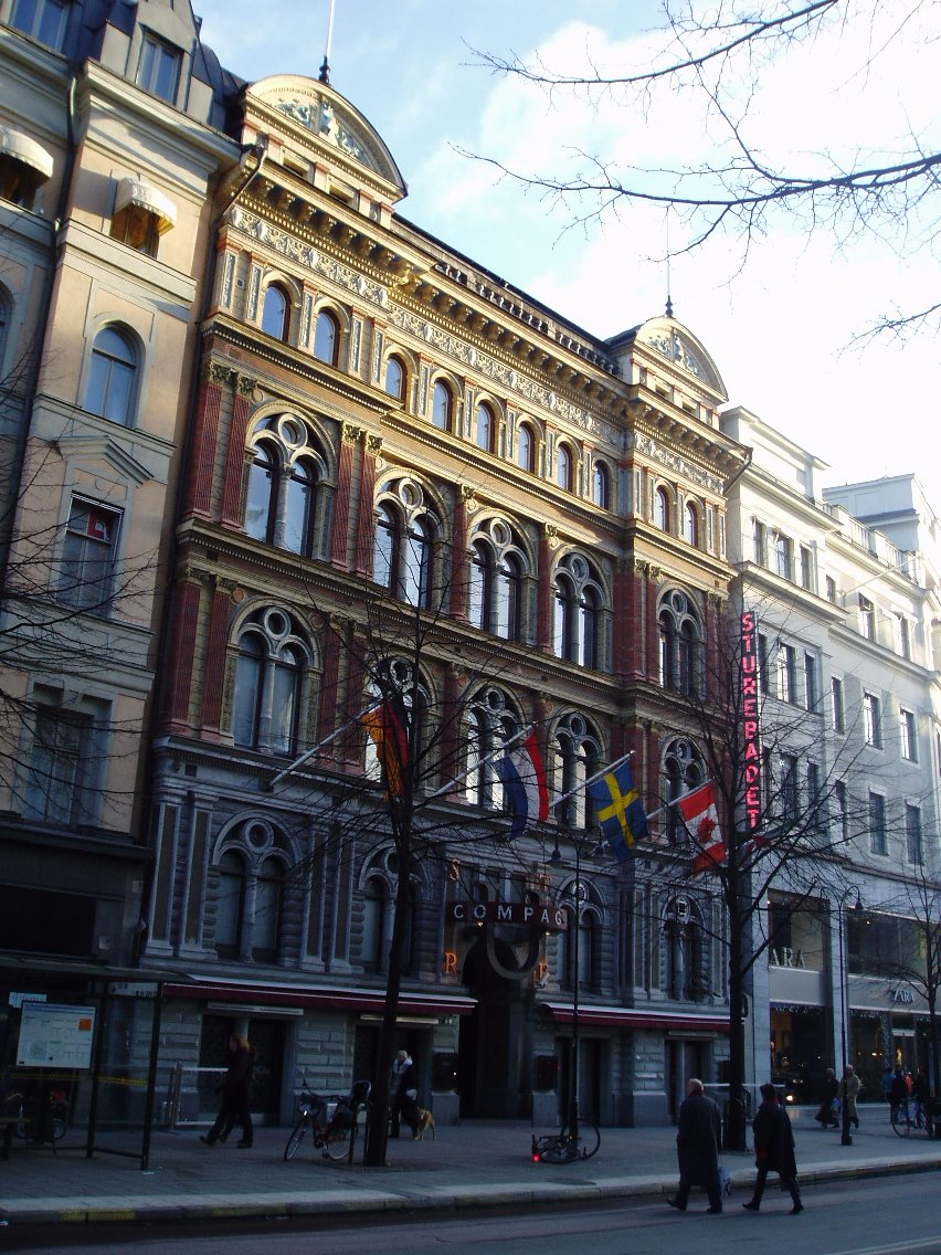 Sturebadet fasad, Östermalm, Stockholm